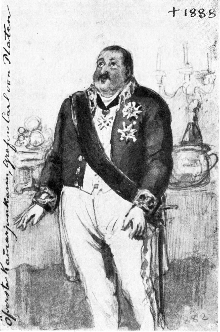 Carl von Platen (1833-1888)